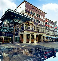 Hauptstelle der Sparkasse Bremerhaven